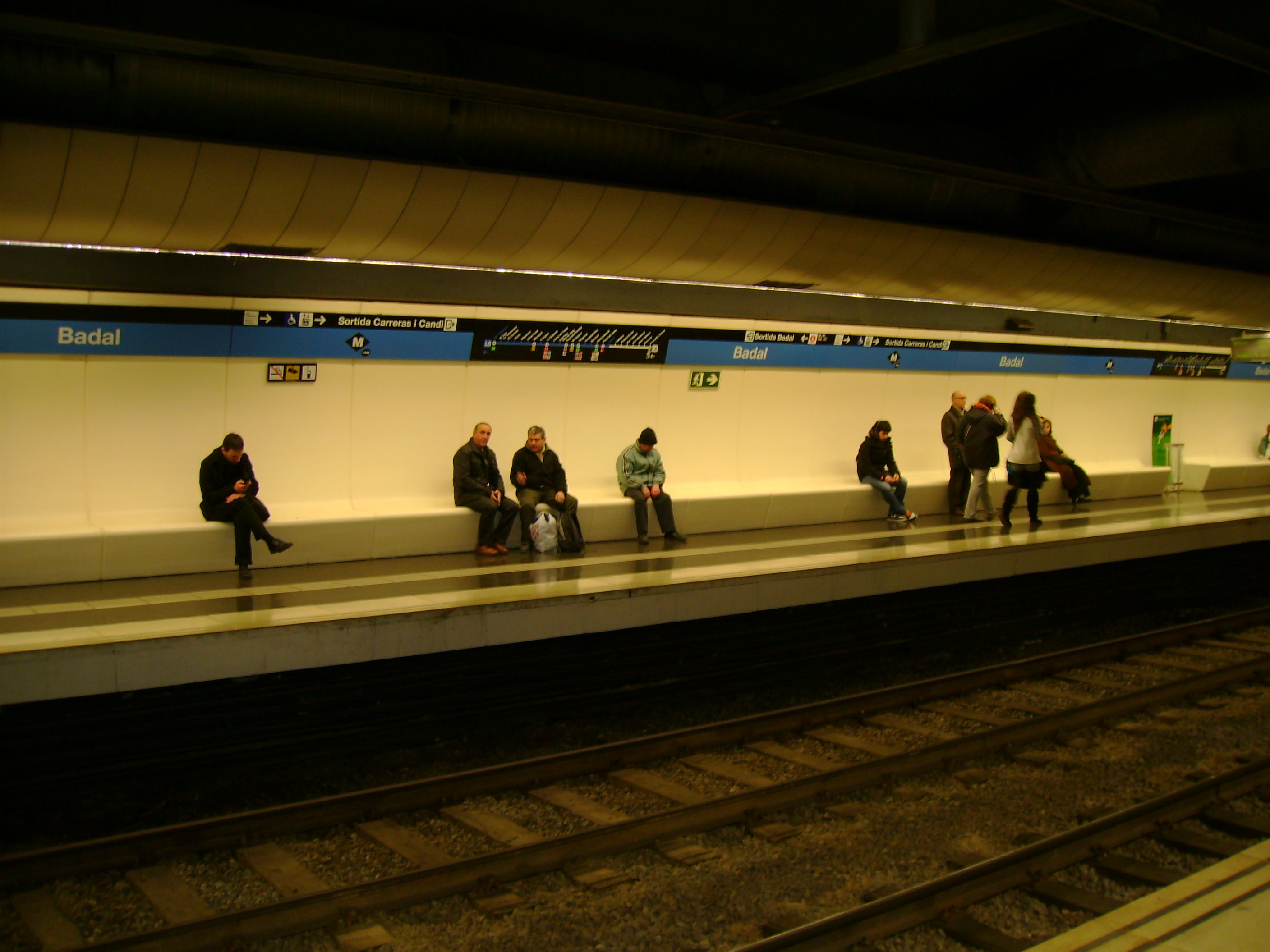 Foto capturada per la meva càmara a l'estació de Badal (Metro de Barcelona).